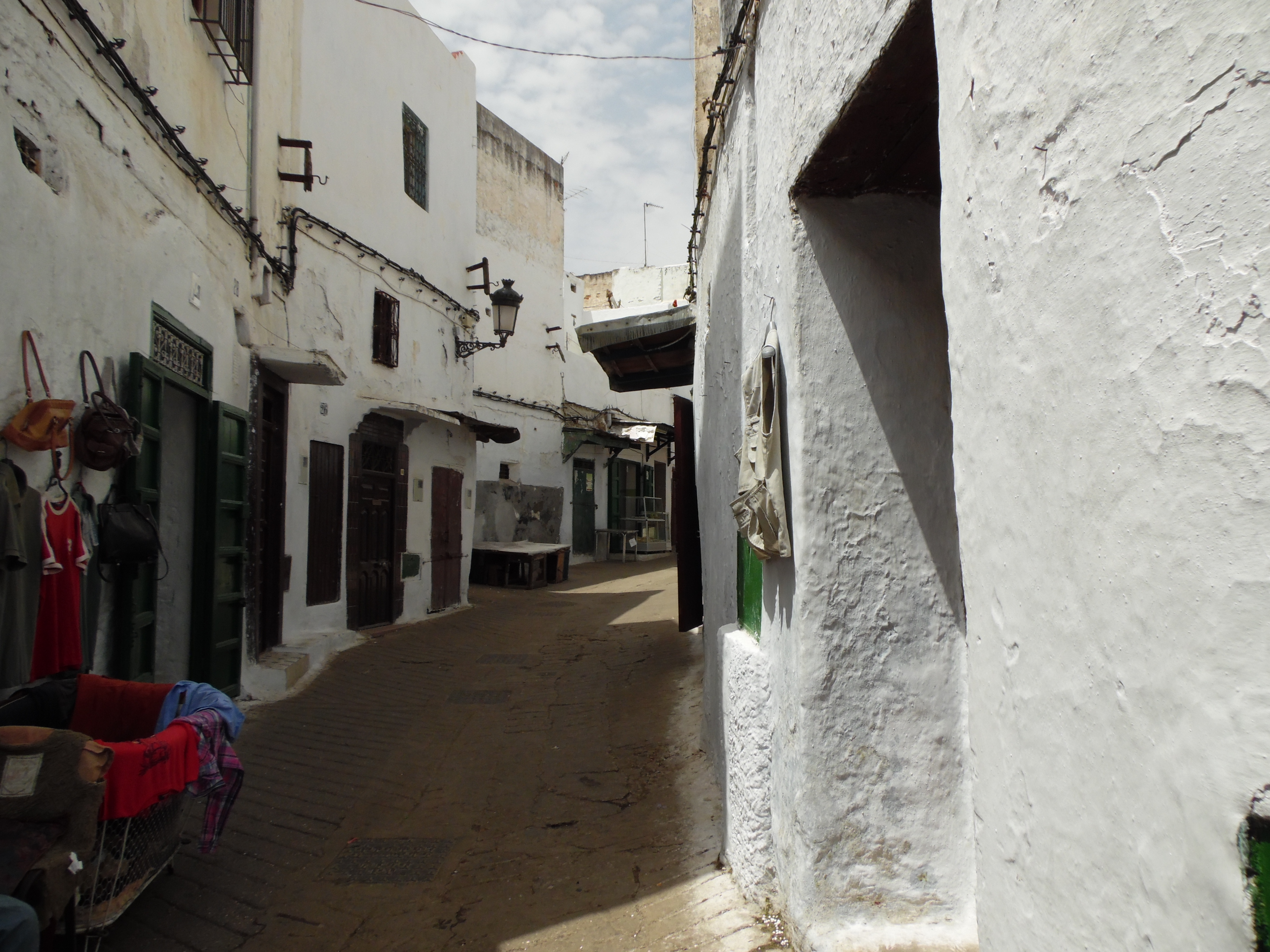 Verano 2015